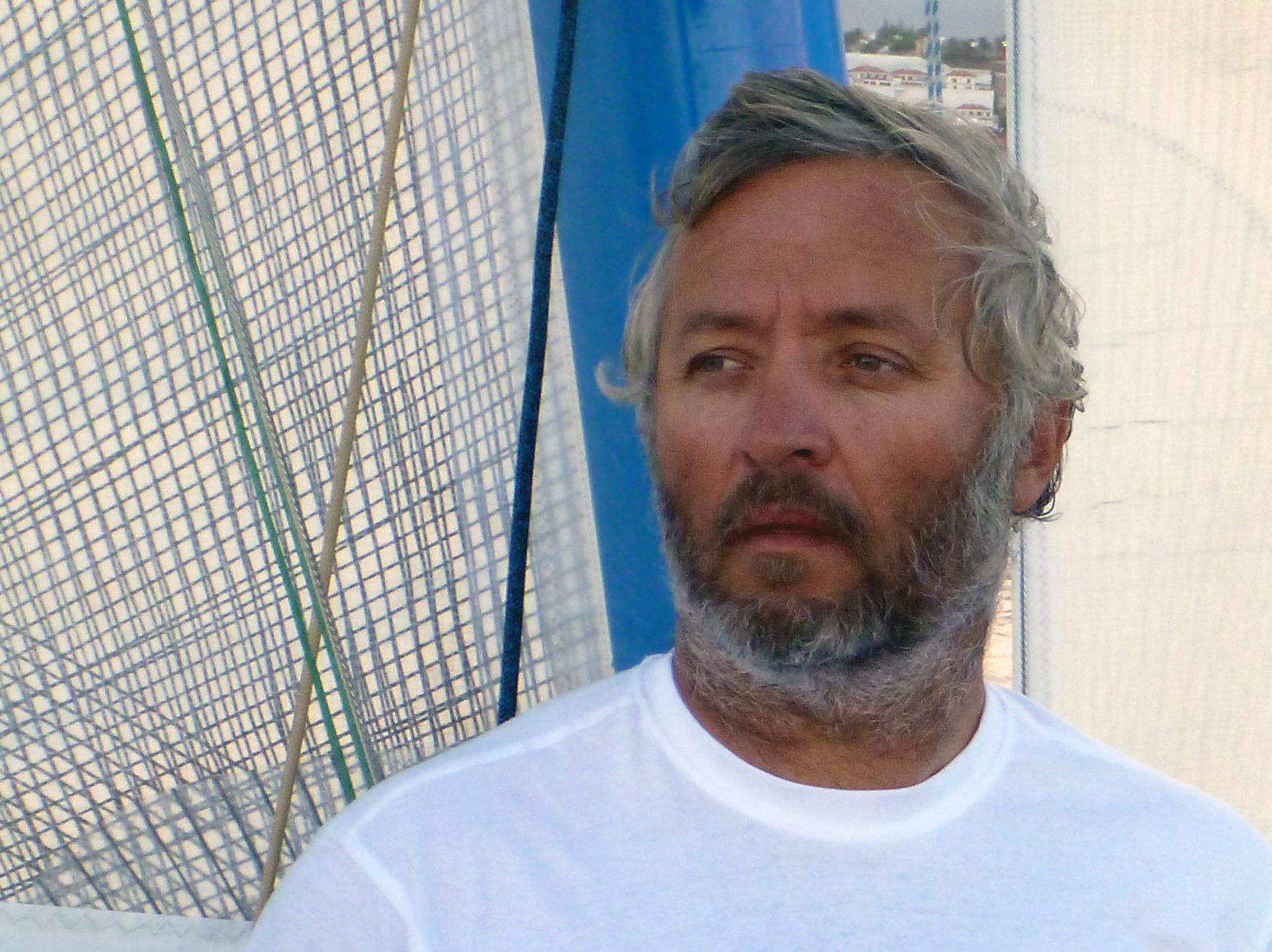 Yvan lors d'une sortie au large de Las Palmas (Gran Canaria) sur le catamaran "non habitable" avec lequel il réalise le tour du monde.